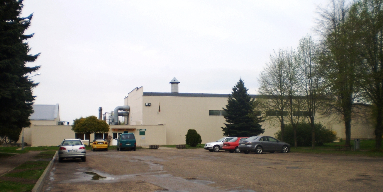 Kėdainių sporto mokykla, Vilainiai, Kėdainių raj.